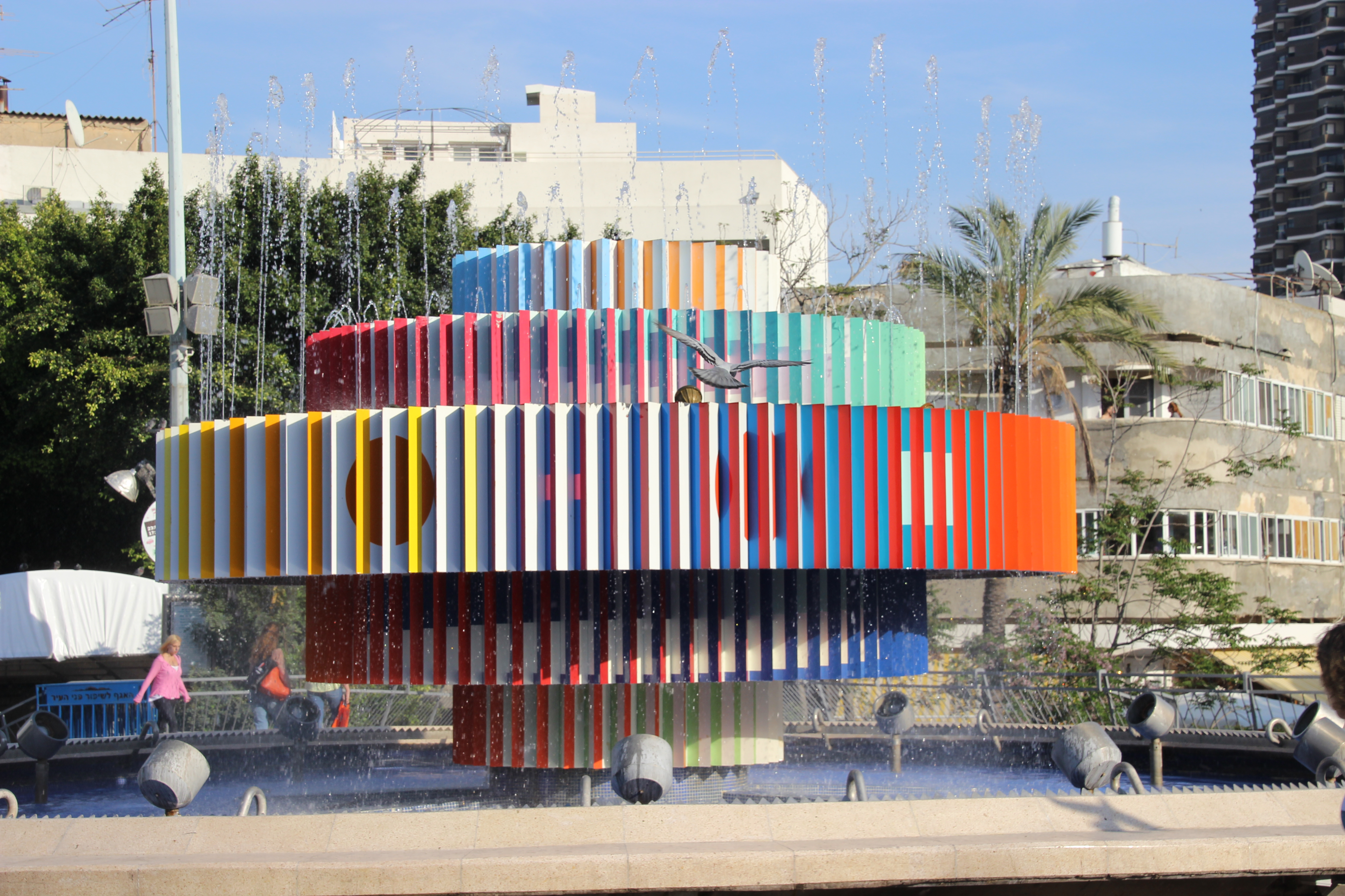 כיכר צינה דיזנגוף קרויה על שם צינה דיזנגוף, רעייתו של ראש העיר הראשון, מאיר דיזנגוף. הכיכר נחשבה במשך שנים רבות כאחד מסמליה של תל אביב. הכיכר הייתה חלק מתוכנית גדס, תוכנית מתאר לעיר תל אביב שהכין פטריק גדס, מתכנן ערים סקוטי. עיצוב הכיכר נעשה על ידי האדריכלית ג'ניה אוורבוך, שזכתה בתחרות העיצוב של הכיכר בשנת 1934. התכנון היה על פי קריטריונים של הסגנון הבינלאומי, שהיה הסגנון האדריכלי המרכזי בתל אביב בתקופה זו.